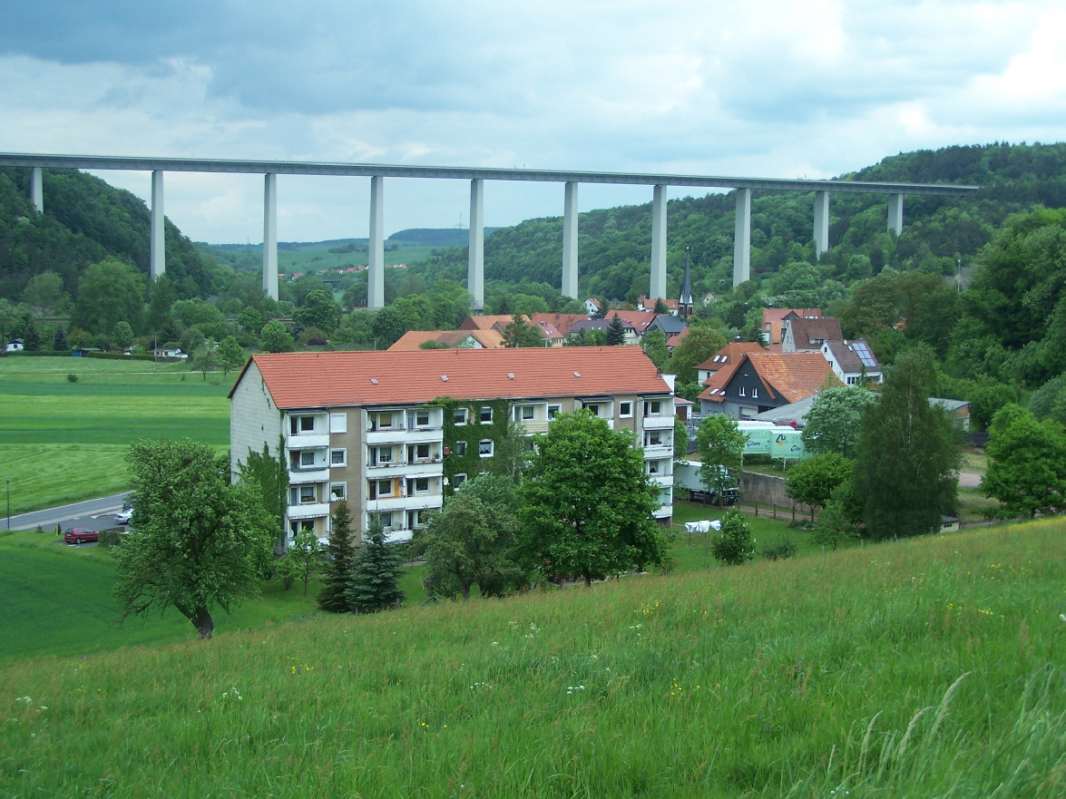 Hörschel bei Eisenach (links der Zickelsberg und rechts der Hörschelberg)